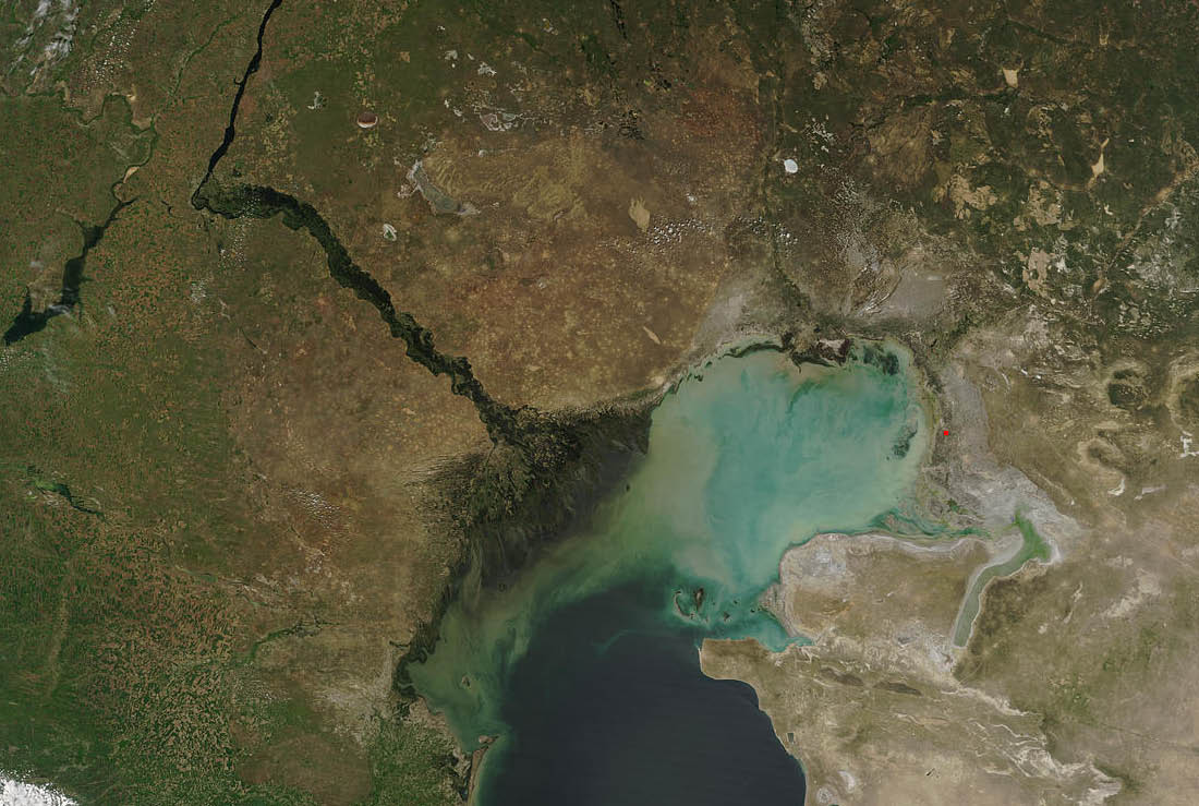 Caspian Depression Satellite photo.